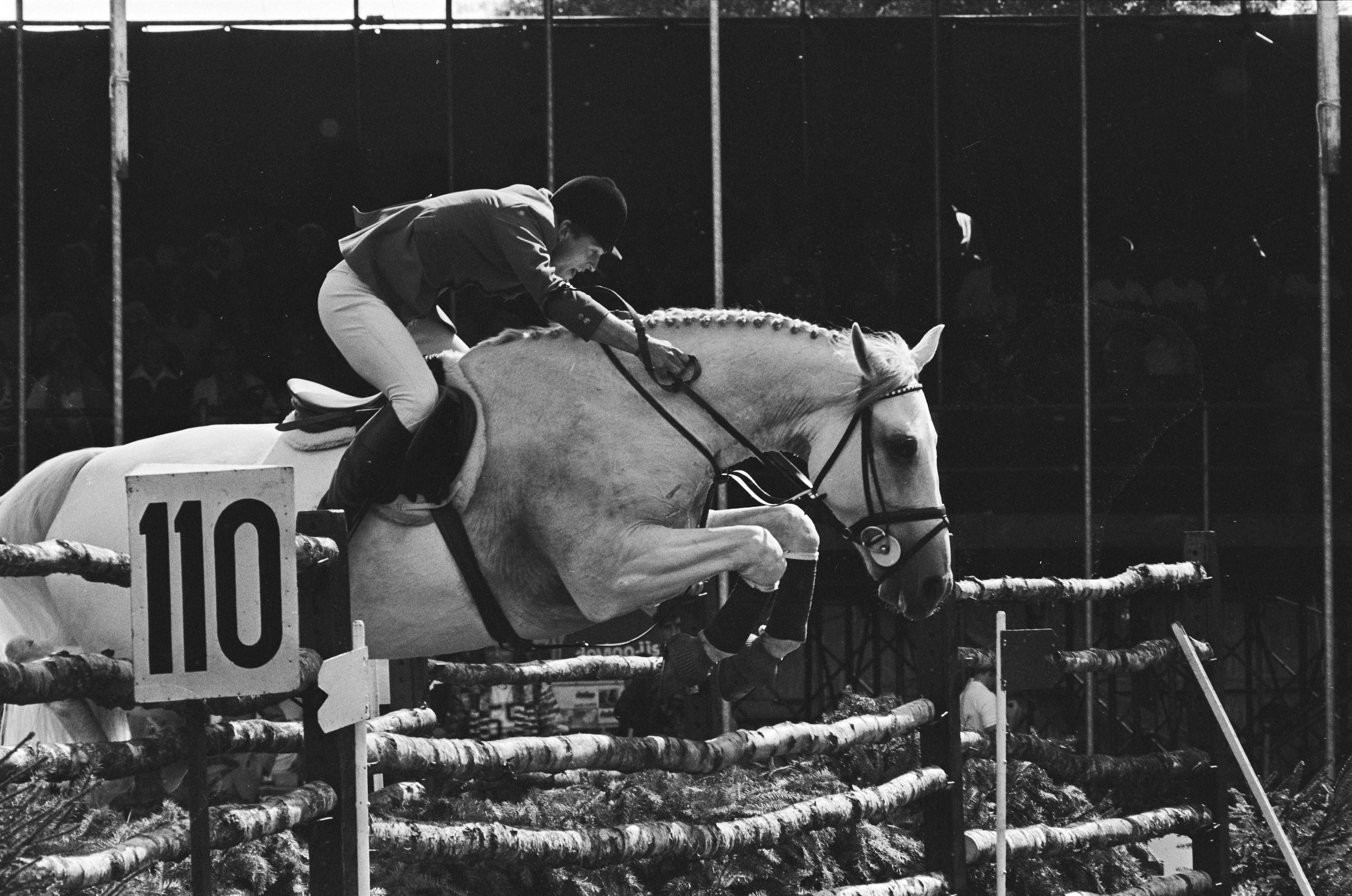 Collectie / Archief : Fotocollectie Anefo Reportage / Serie : [ onbekend ] Beschrijving : Eerste CHIO in Rotterdam, prijs Toerisme; Henk Nooren met paard Cats Whiskers Datum : 23 augustus 1978 Locatie : Rotterdam, Zuid-Holland Trefwoorden : concoursen, paardesport, sport, springruiters Persoonsnaam : Cats Whiskers, Nooren Henk Instellingsnaam : CHIO Fotograaf : Peters, Hans / Anefo Auteursrechthebbende : Nationaal Archief Materiaalsoort : Negatief (zwart/wit) Nummer archiefinventaris : bekijk toegang 2.24.01.05 Bestanddeelnummer : 929-8702 Reacties Geplaatst door Jo Boeijen op 30 maart 2015 - 13:39. Wie was in 1975 Nederlands kampioen Paard springen bij de NHS en waar??